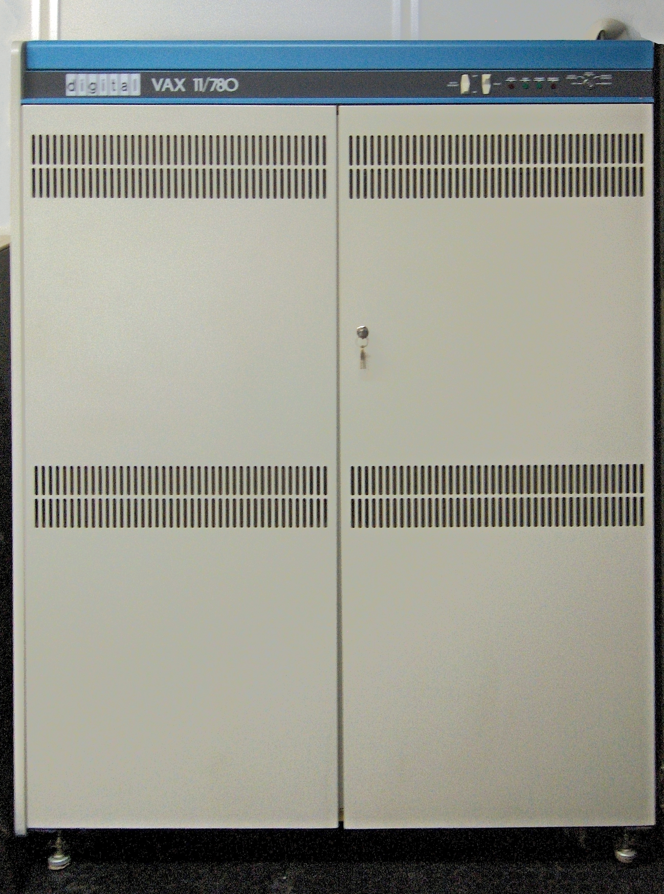 Elaboratore Digital VAX 11/780